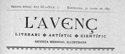 Portada de L'avenç